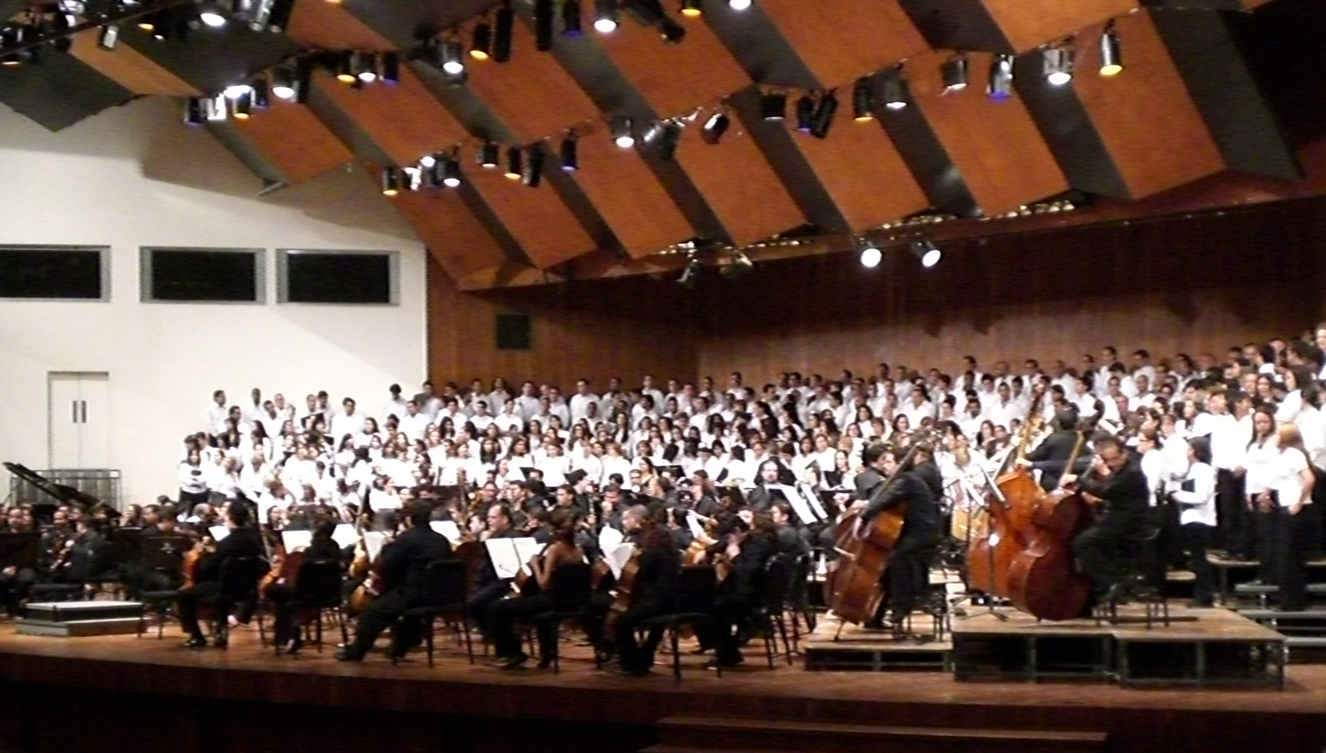 Interpretación de la Cantata Criolla de Antonio Extévez, Aula Magna, Universidad Central de Venezuela.